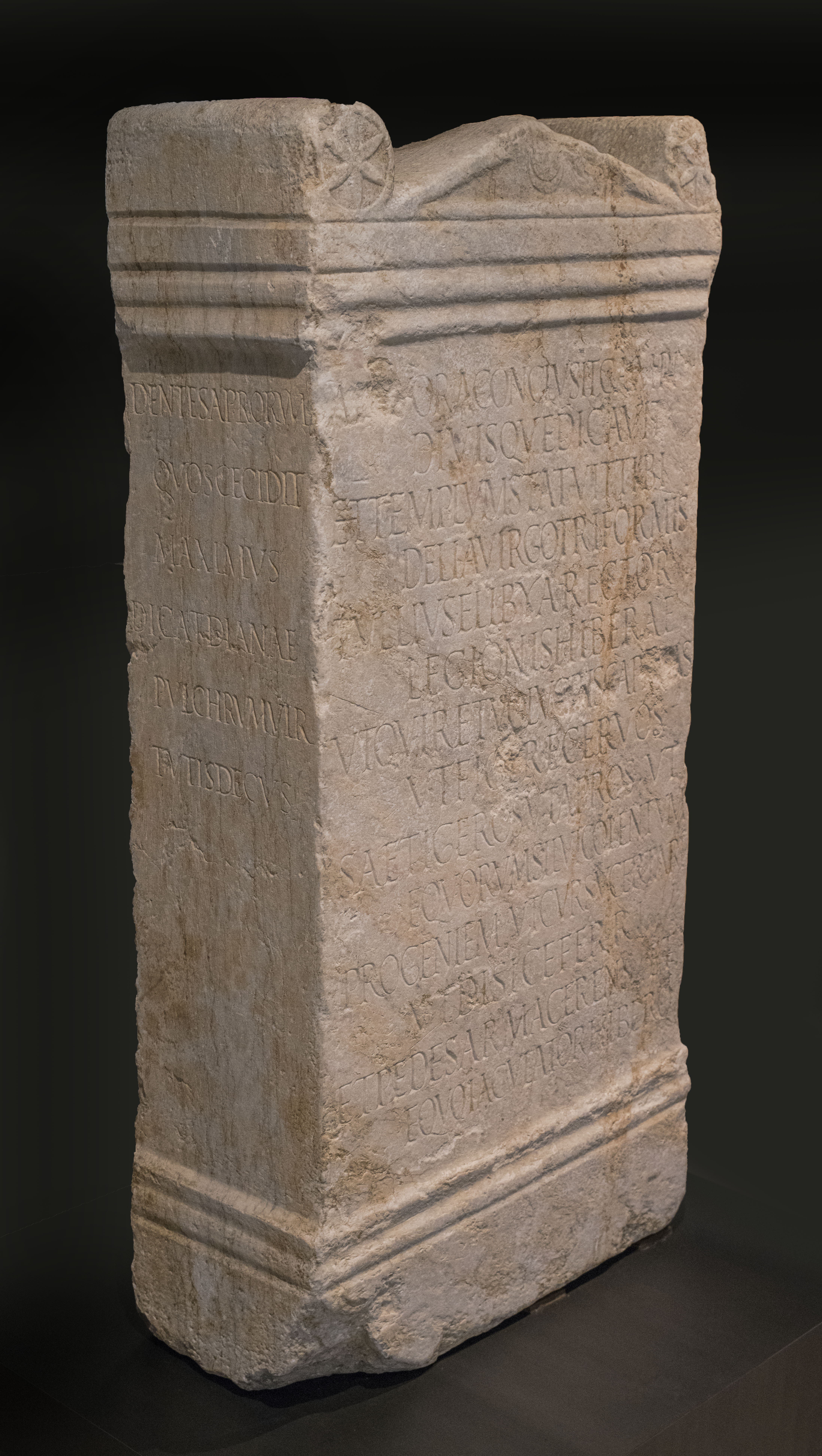 Este ara tallada en mármol está datada en el año 165 y se encontró incrustada en la zona norte de la muralla de León hacia 1870. Contiene cuatro inscripciones en cada una de las caras tanto en prosa (cara prinipal) como en verso (las otras tres).